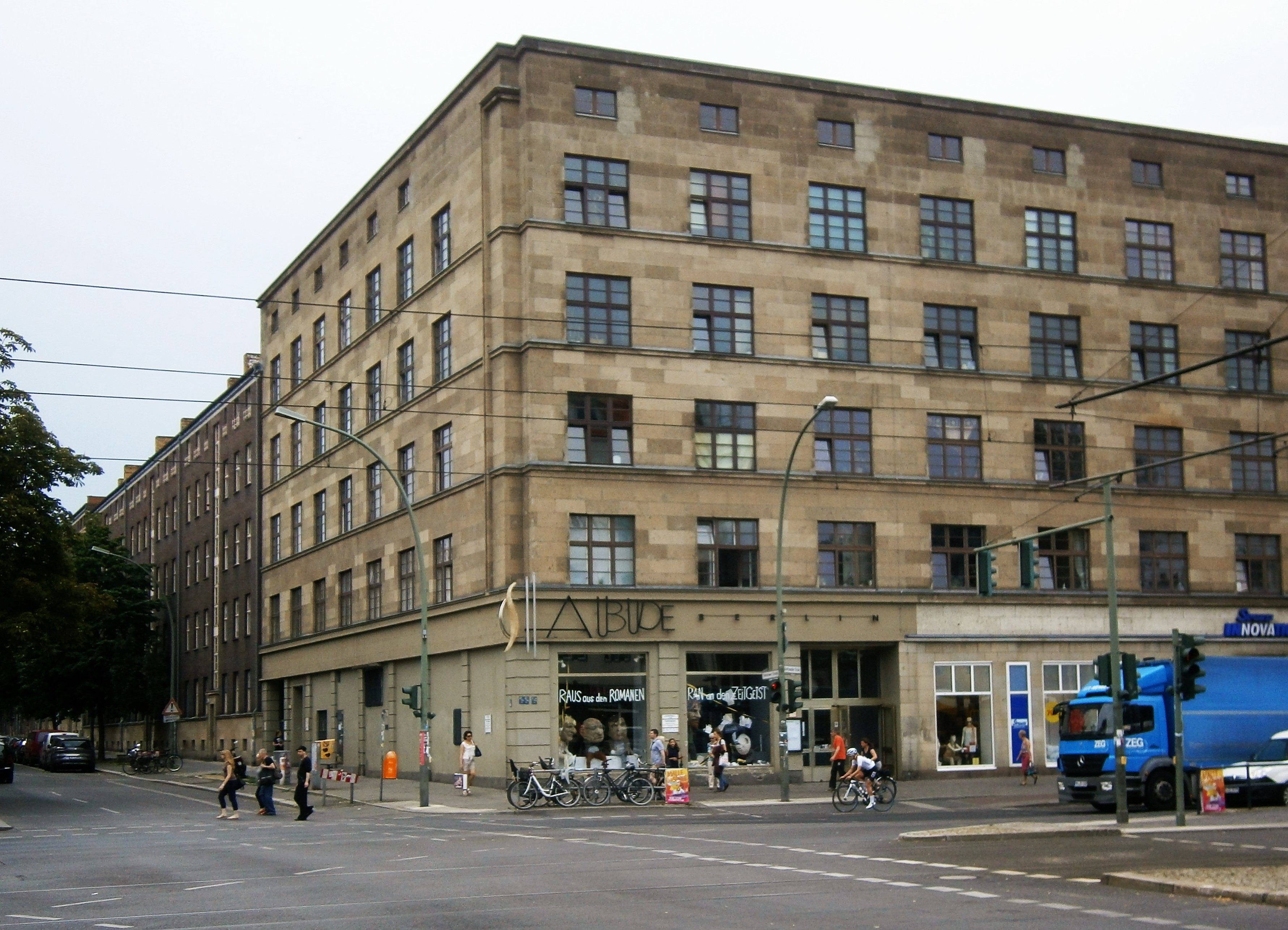 Die Greifswalder Straße ist eine straße im Berliner Bezirk Pankow, Ortsteil Prenzlauer Berg. Im Bild das Eckhaus Nummer 84/ Storkower Straße 2. Im Erdgeschoss befindet sich das Puppentheater Schaubude. 1949 bis 1972 befand sich das Filmtheater Atlas.